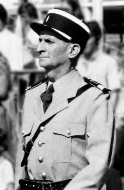 L'acteur français Louis de Funès lors du tournage du défilé final du film Le Gendarme et les Extra-terrestres en 1978, à Saint Tropez.